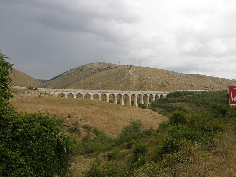 Pesciana 2009